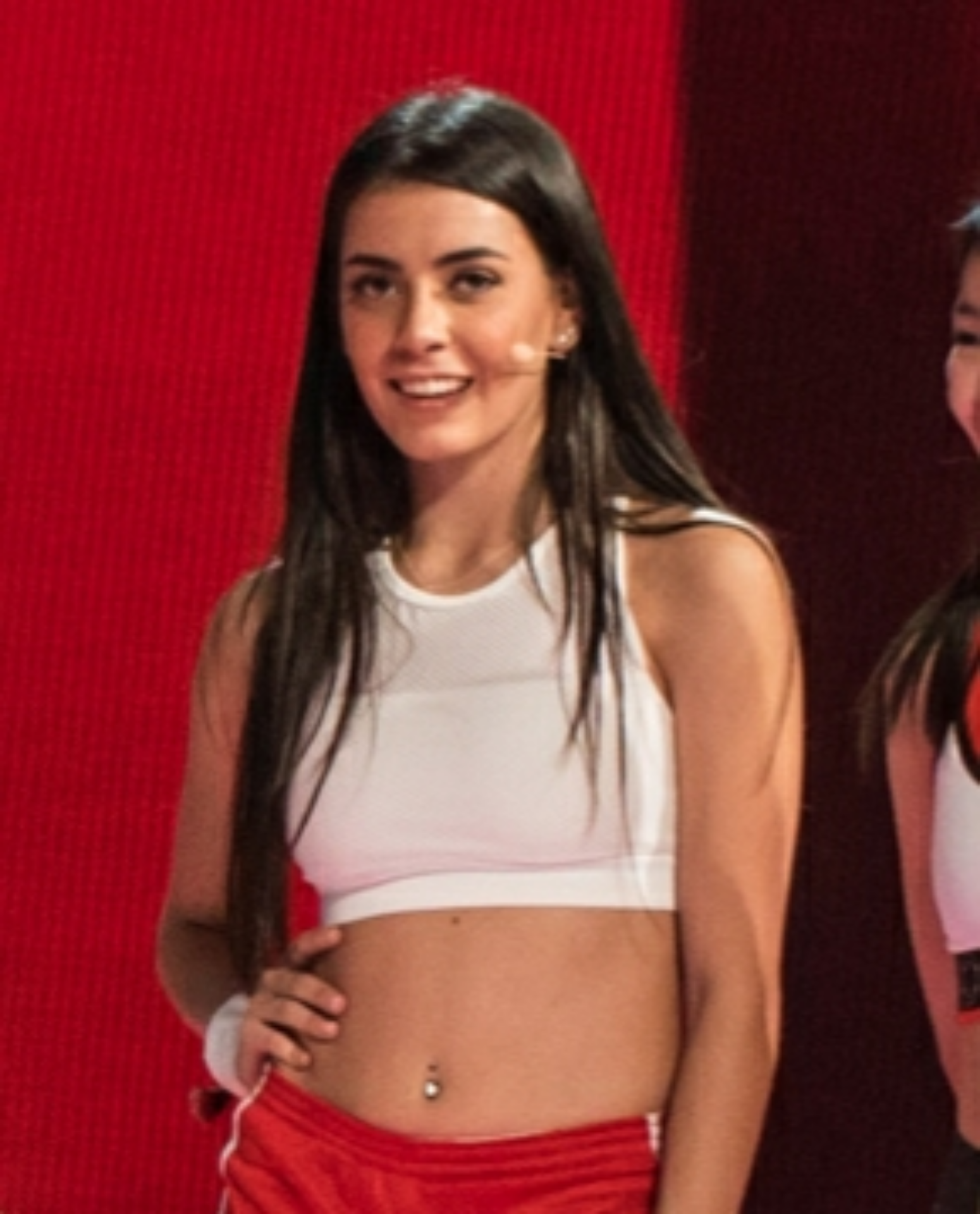 Sabina Hidalgo in 2018